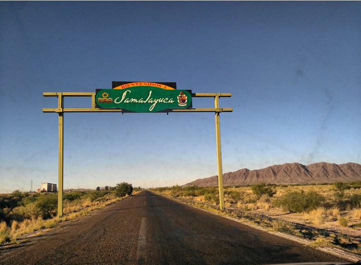 Entrada a Samalayuca, municipio de Juárez, Chihuahua.